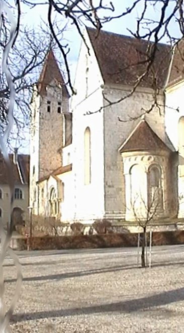 Außenanschicht der Kirche des Stift St. Paul im Lavanttal.